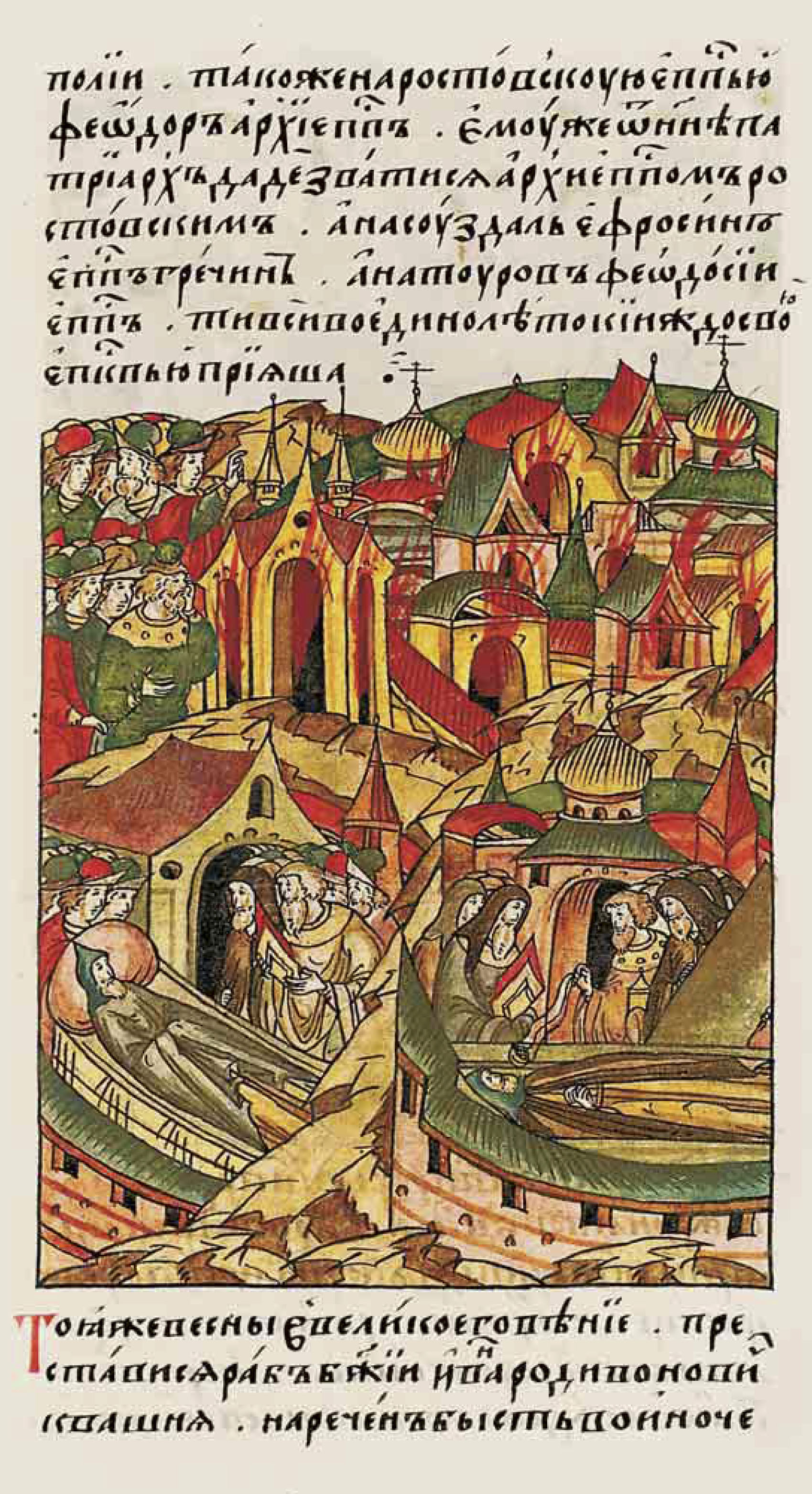 ЛИЦЕВОЙ ЛЕТОПИСНЫЙ СВОД: Той же весной в великое говенье преставился раб Божий Иван Родионович Квашня, нареченный в иночестве [Игнатием, и похоронен был в монастыре Спаса на Всходне. В том же году в Петрово говенье, месяца июля в 22 день, в полдень, в Москве загорелся посад по вине некоего армянина Авраама, и сгорело дворов несколько тысяч, и много зла было причинено христианам.]